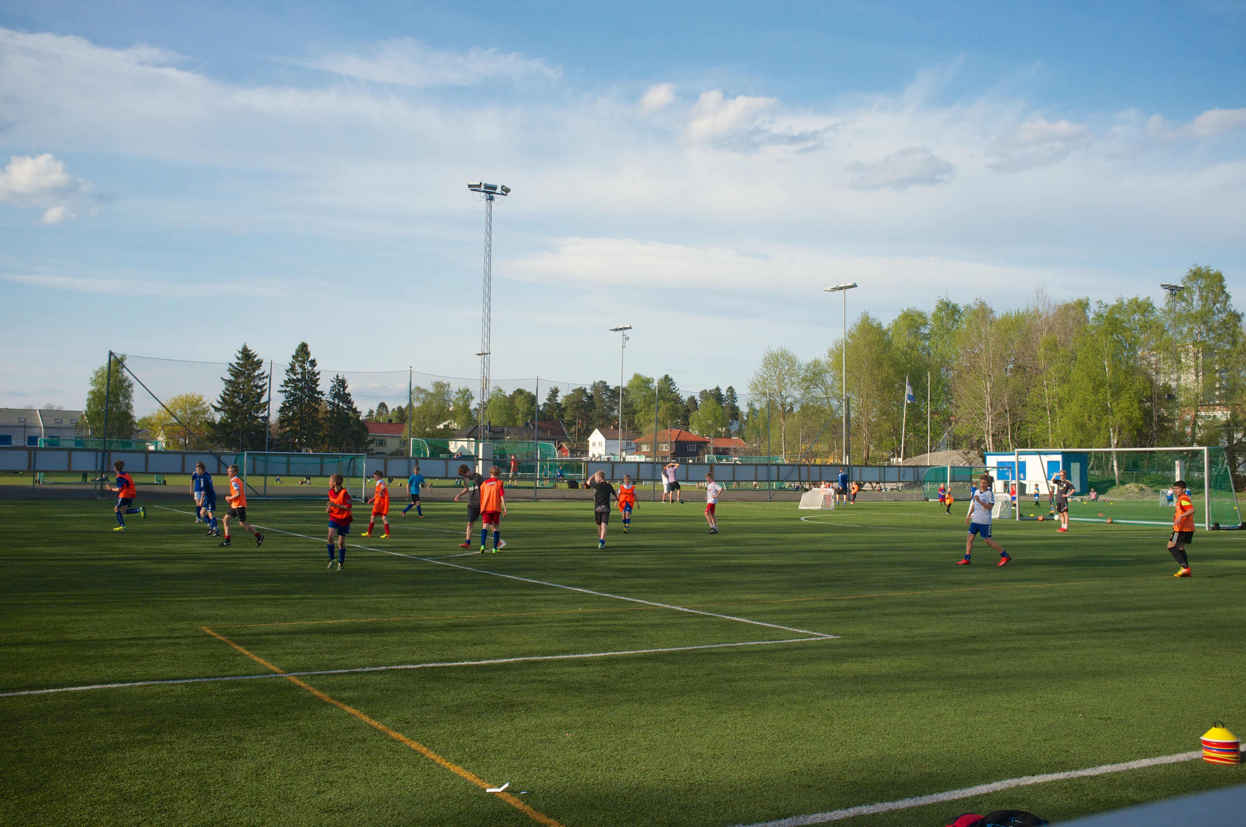 Nordstrand kunstgress i Oslo.